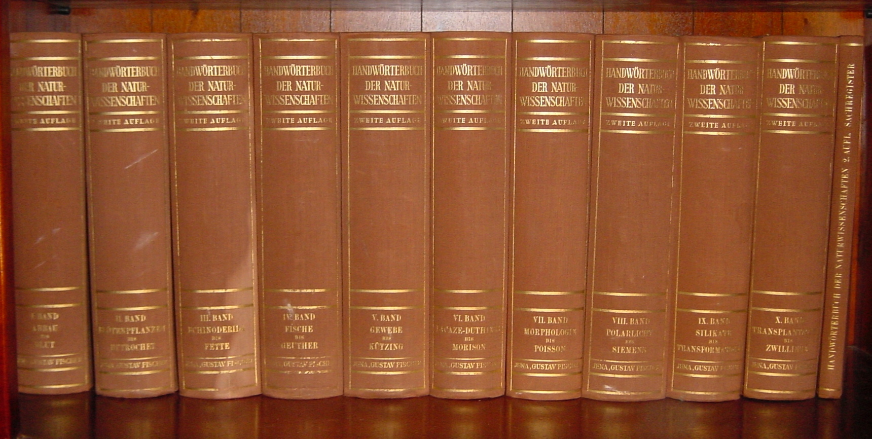 Handwörterbuch der Naturwissenschaften, die Bücher der 2. Auflage, mit Registerband